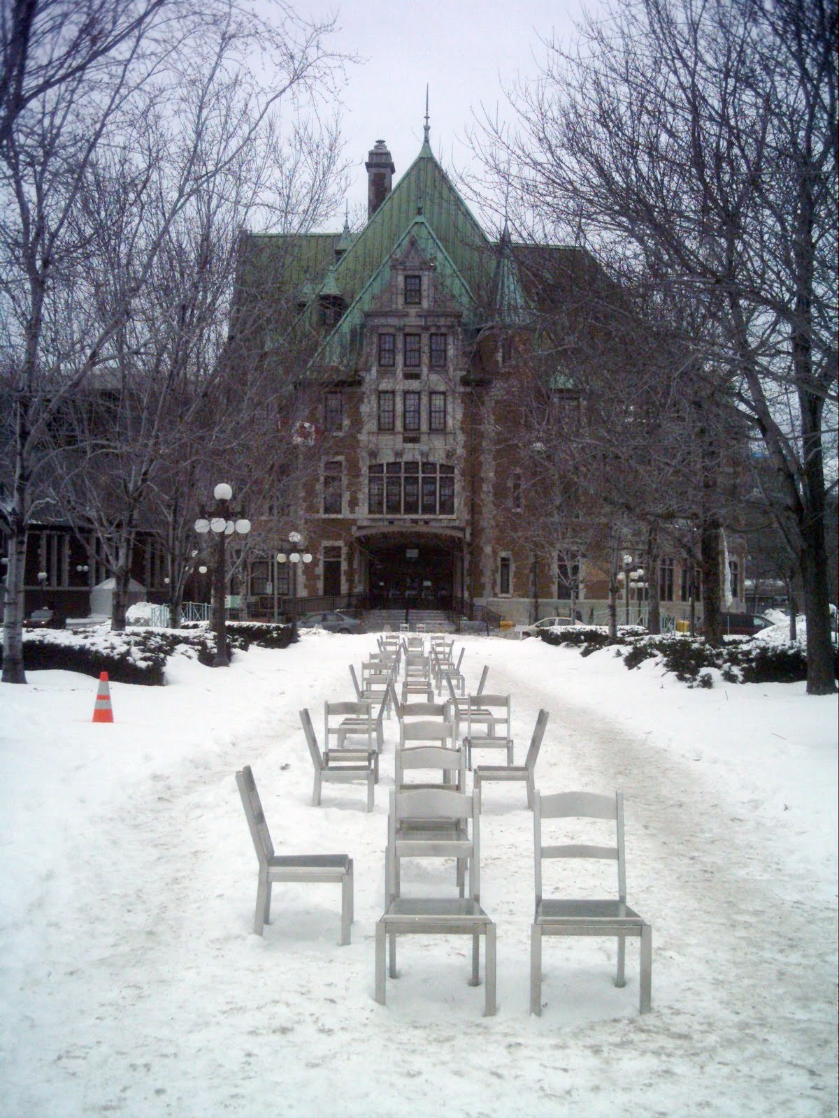 Rêver le Nouveau Monde, œuvre de Michel Goulet offerte par la Ville de Montréal aux citoyens de la Ville de Québec, à l'occasion du 400e anniversaire de sa fondation